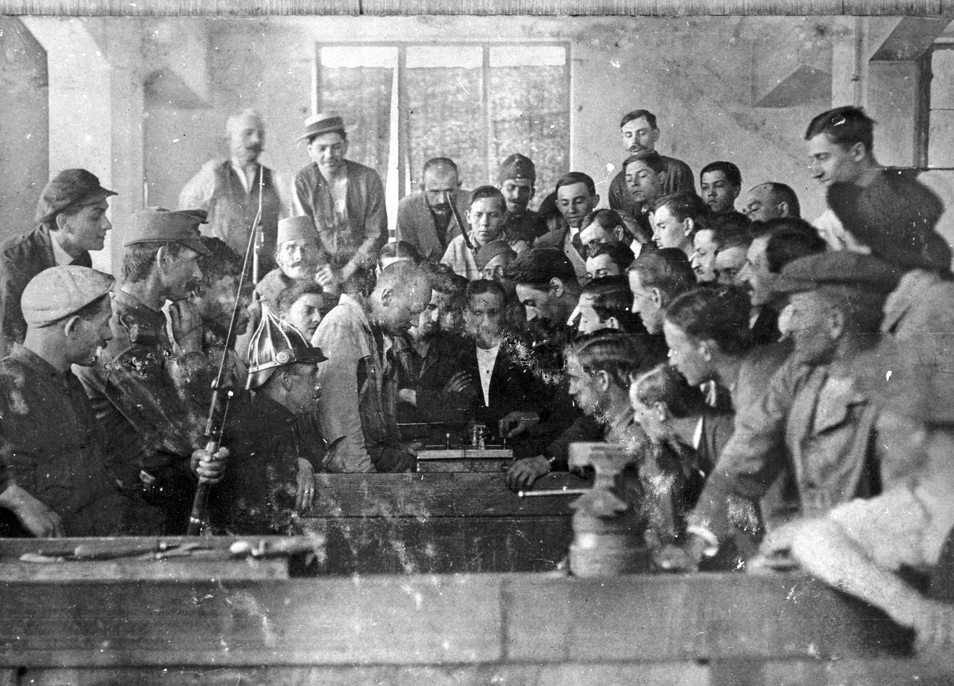 Sakkozó munkások sztrájk idején a Soroksári úti Fegyvergyárban. Location: Hungary, Budapest IX. Tags: weapon, chess, strike, cop, worker, Budapest Title: Sakkozó munkások sztrájk idején a Soroksári úti Fegyvergyárban.